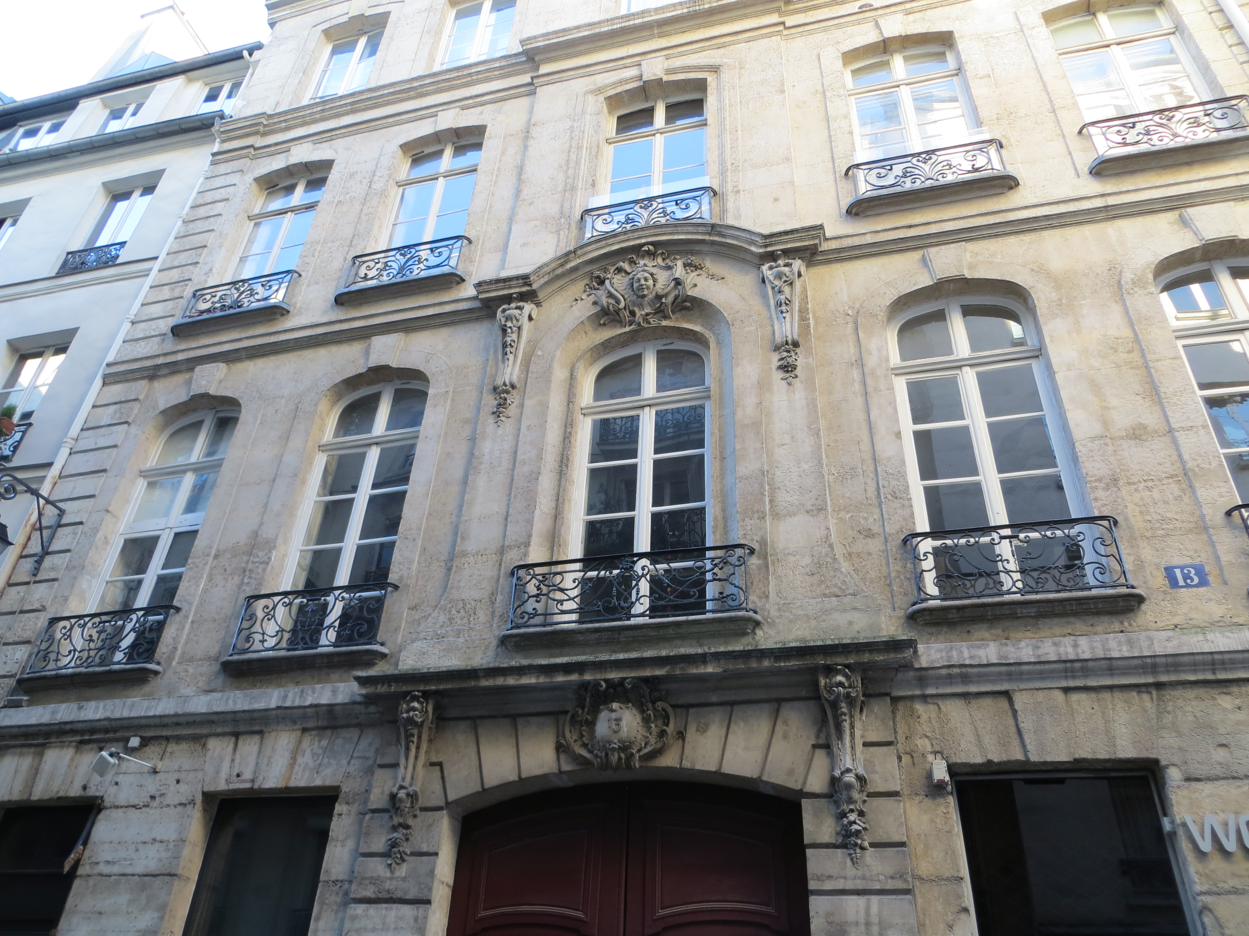 Rappresenta l'ultima abitazione a Parigi di Silvia Balletti dove morì il 16 settembre 1758